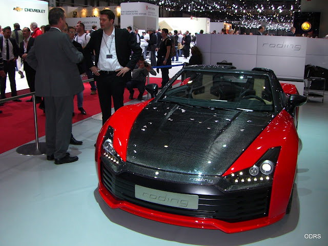 Roding Roadster 23 Weltpremiere Genf